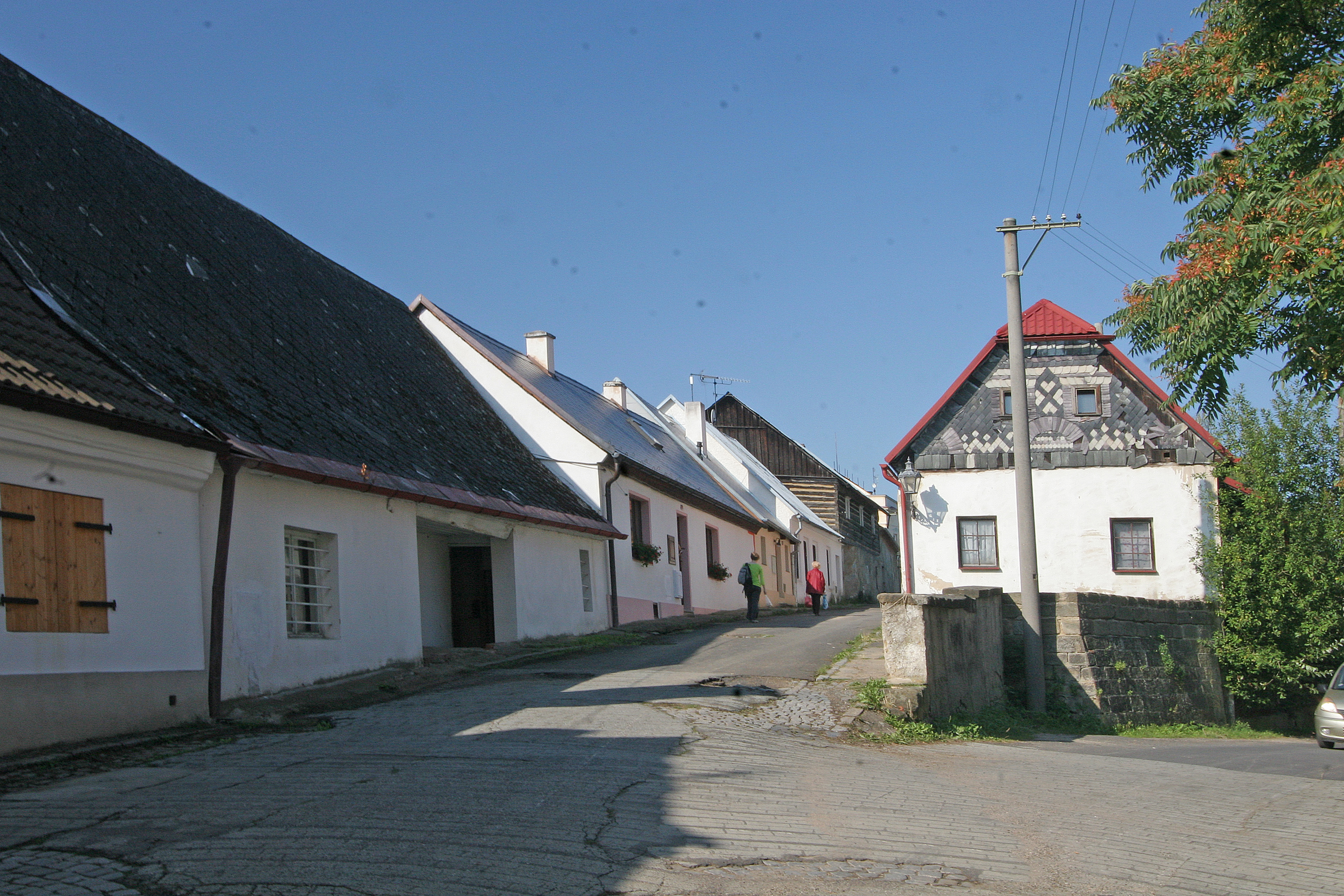 Ptačí domky, České Předměstí, 1. máje 29, 30, 31, 32 s hospodářskou budovou, 61